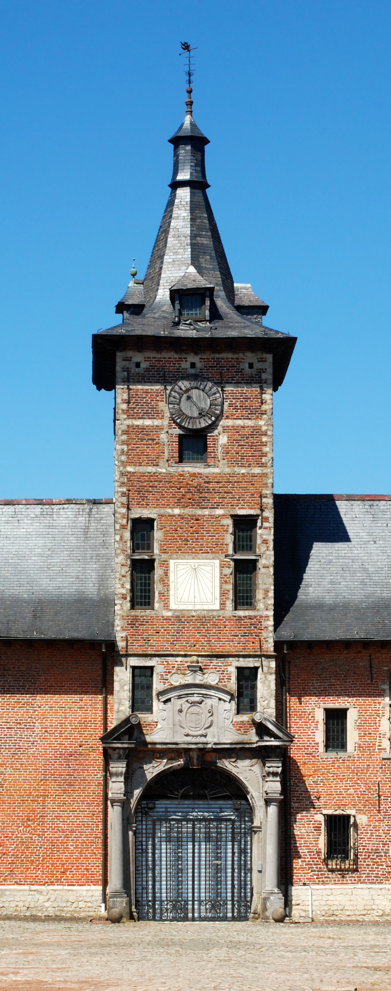 Belgique - Brabant wallon - Château de Rixensart